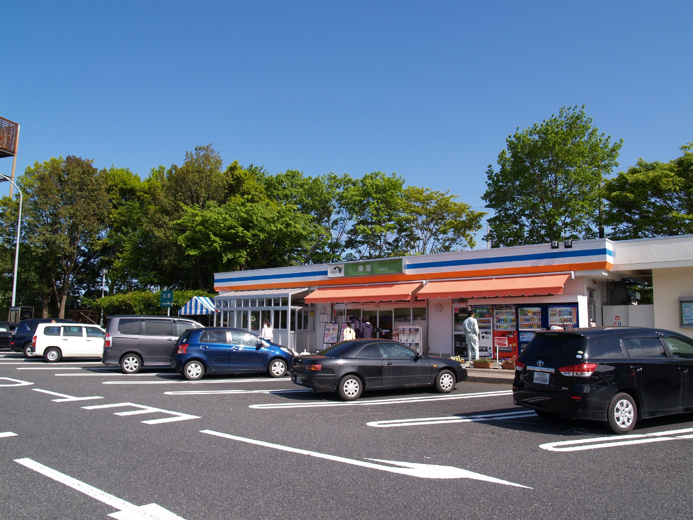 東海パーキングエリア上り線施設